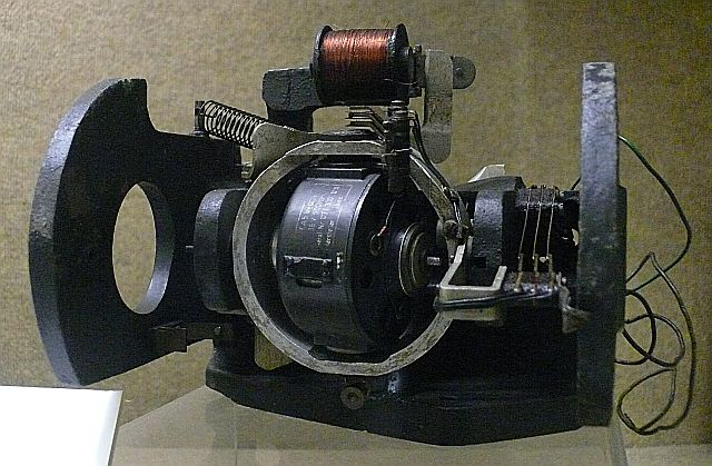 Rollkreisel HV-3, eigenes Bild